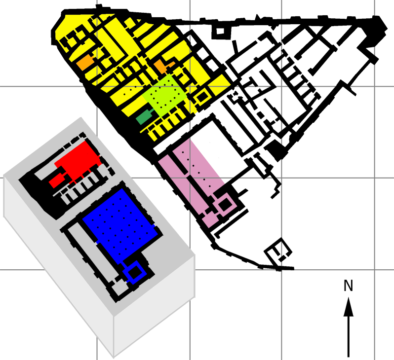 Urartian city Erebuni (plan)